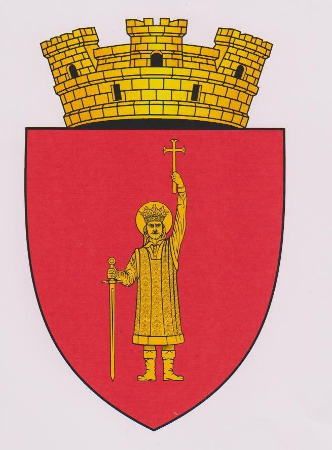 Aceasta este stema orașului Ștefan Vodă